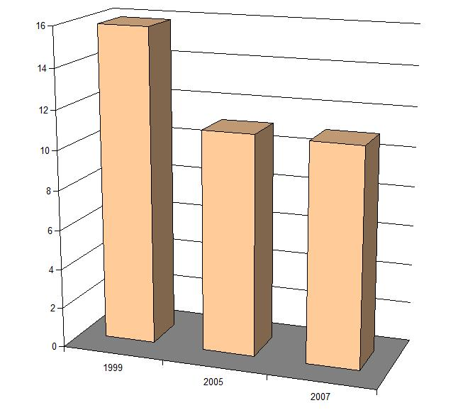 Taux de chômage à Coupru (Aisne, France).